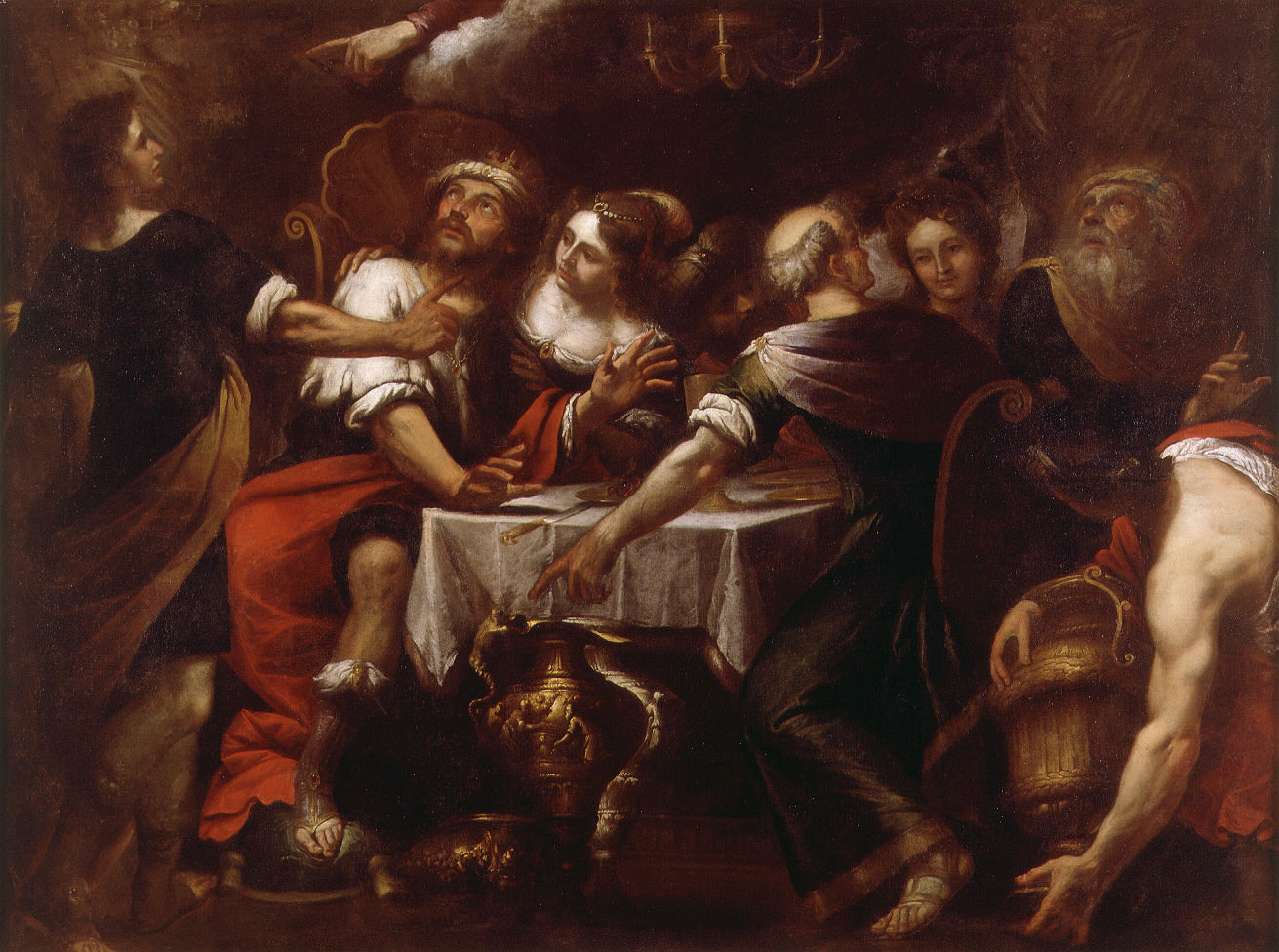 La obra representa al rey Baltasar de Babilonia cenando en compañía de sus cortesanos al tiempo que unas letras, según el relato consignado en el Libro de Daniel, que forma parte del Antiguo Testamento, comienzan a aparecer en la pared asustando a los reunidos. Y fue el profeta Daniel, según el relato bíblico, quien interpretó para el rey el significado del mensaje y le anunció que su reino sería destruido por los persas.